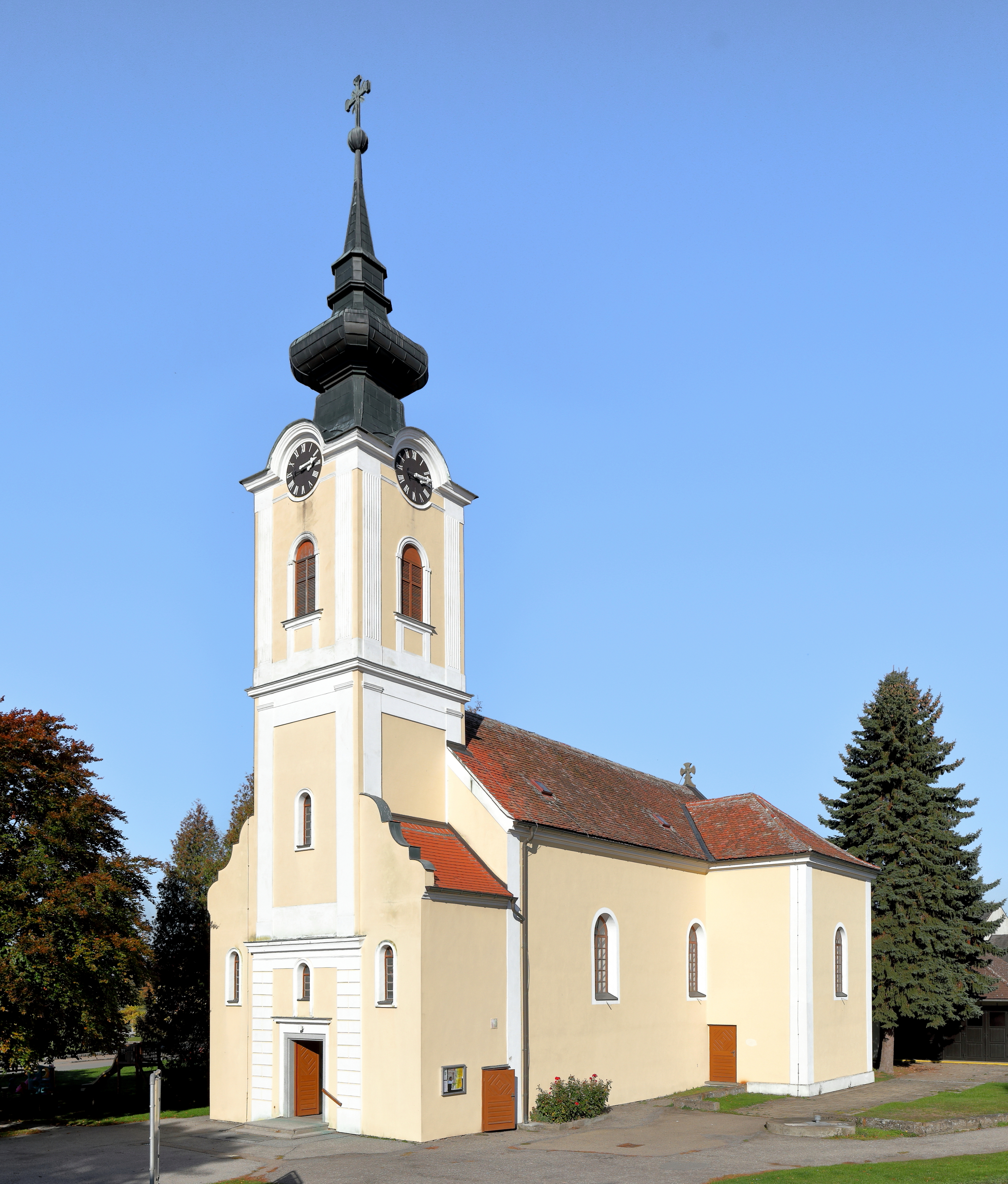 Südwestansicht der röm.-kath. Pfarrkirche hll. Märtyrer Johannes und Paulus in Zissersdorf, ein Ortsteil der niederösterreichischen Stadt Drosendorf-Zissersdorf.Die Saalkirche mit rundem Chorschluss wurde im josephinischen Stil errichtet. Der 37 m hohe Zwiebelturm ist zwischen niedrigen Anbauten eingestellt. Von 1906 bis 1908 wurde die Kirche umgebaut und erweitert. Dabei erhielt die Kirche einen Sakristeitrakt und eine Marienkapelle, die querhausartig angebaut wurden.